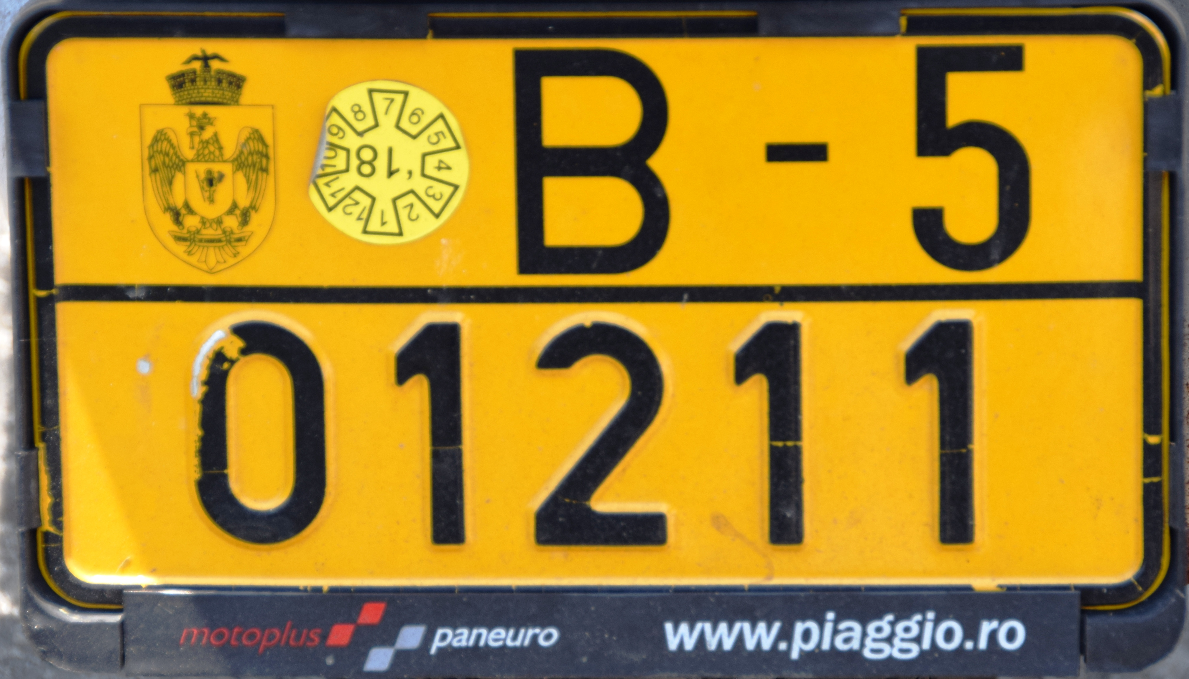 bromfiets kentekenplaat Roemenië Boekarest